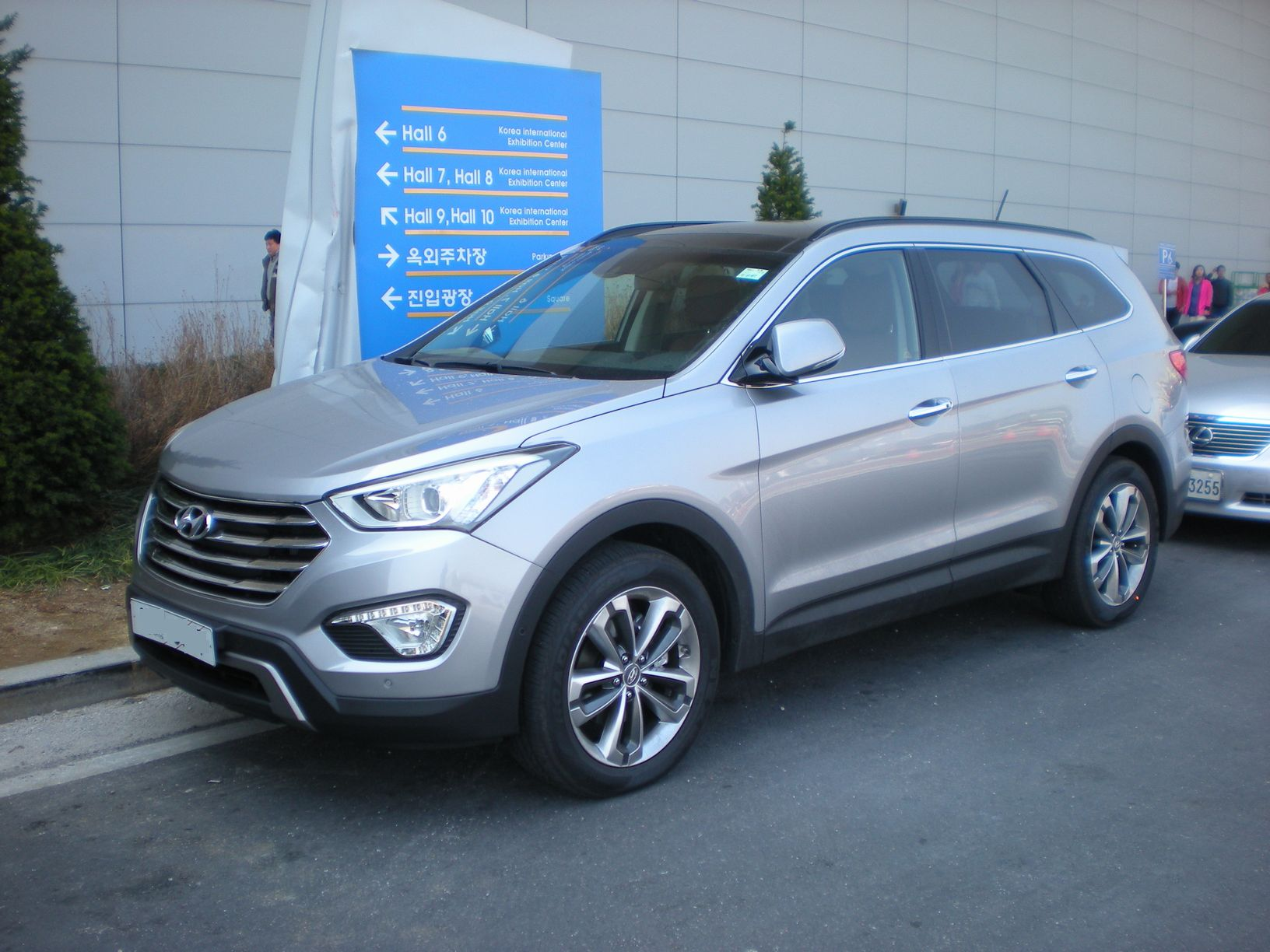 ヒュンダイ・マックスクルーズ